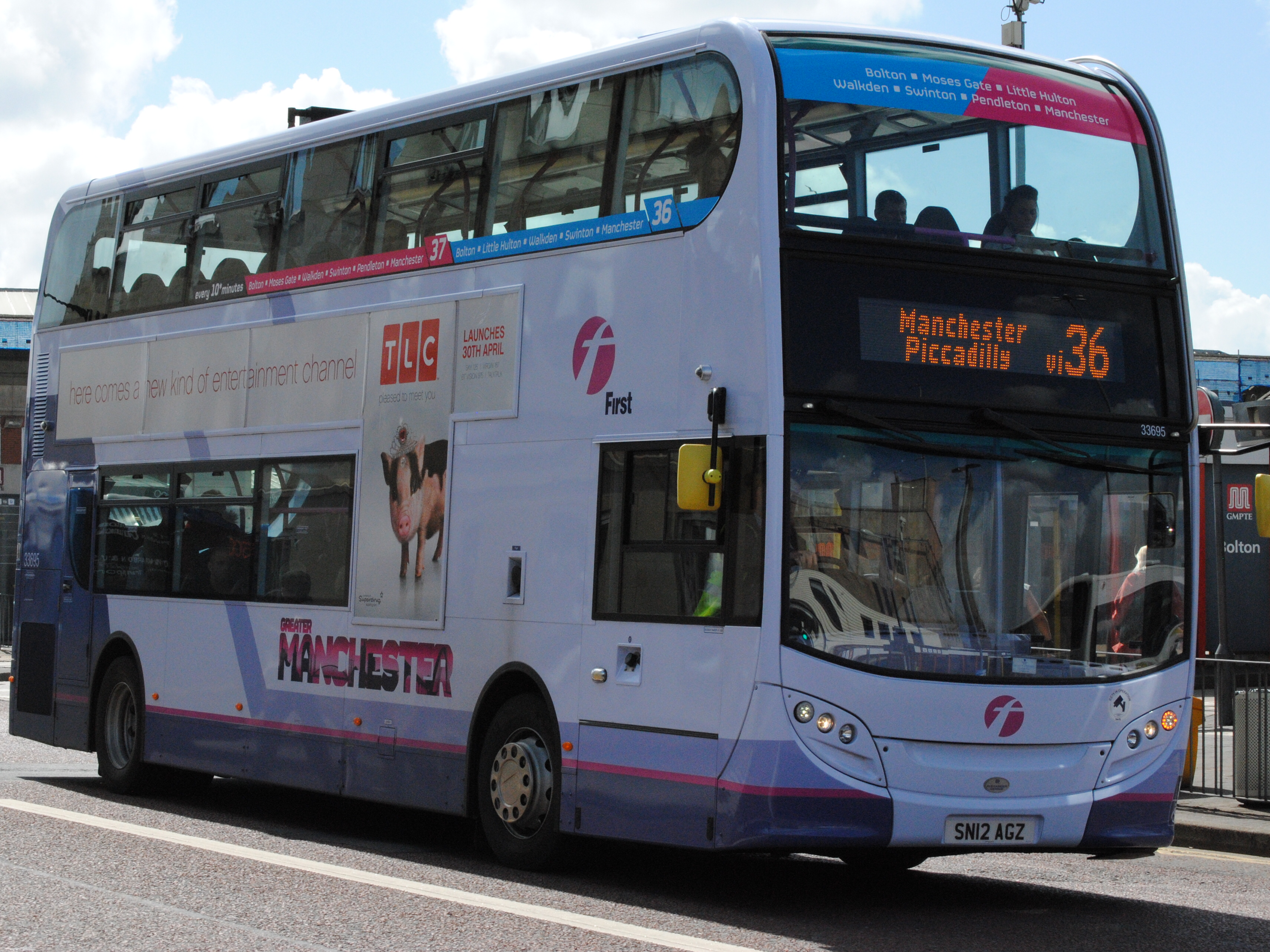 Alexander Dennis Enviro 400